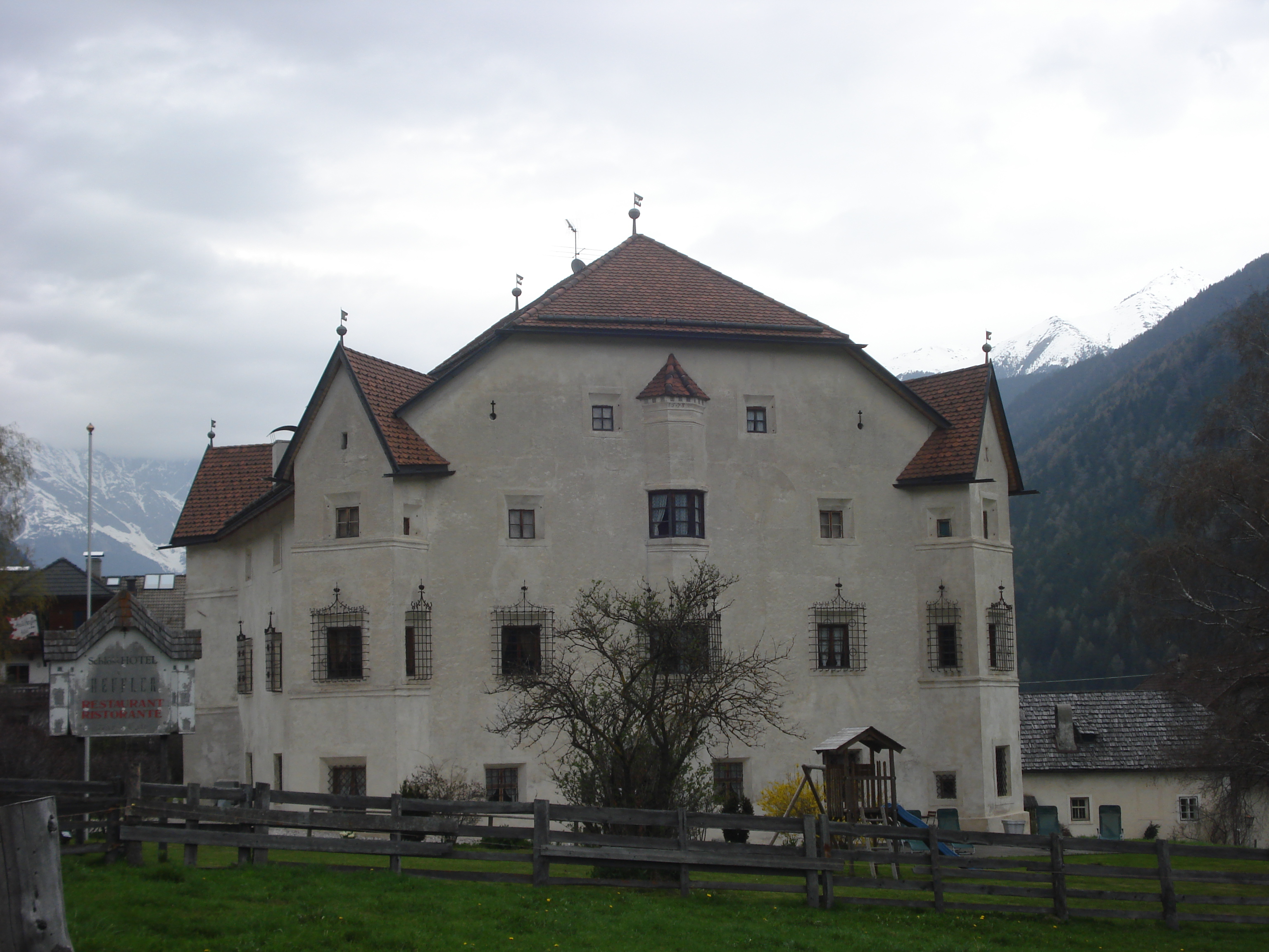 Deitsch: Ansitz Heufler in Rasen